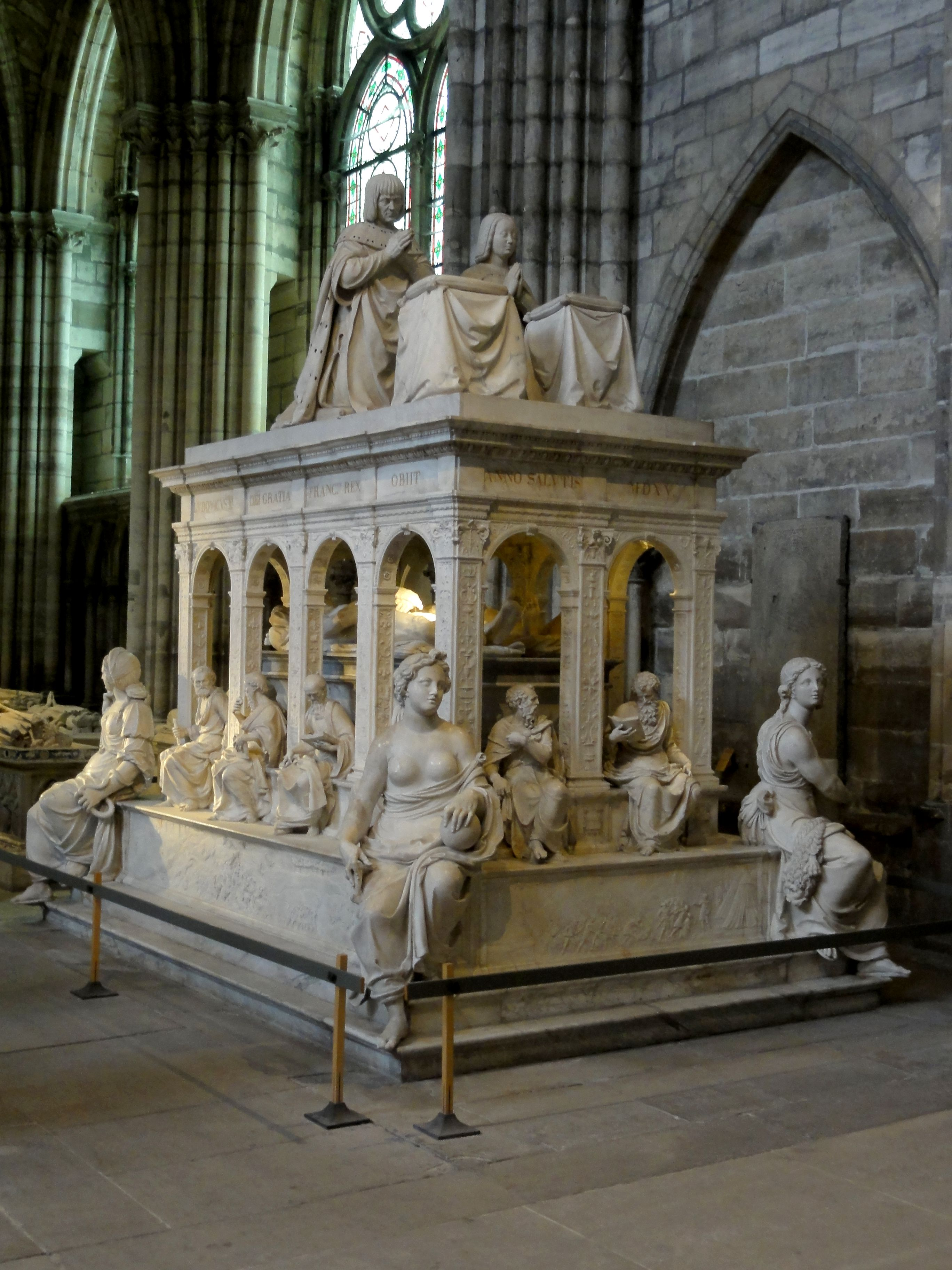 Vue depuis l'est.